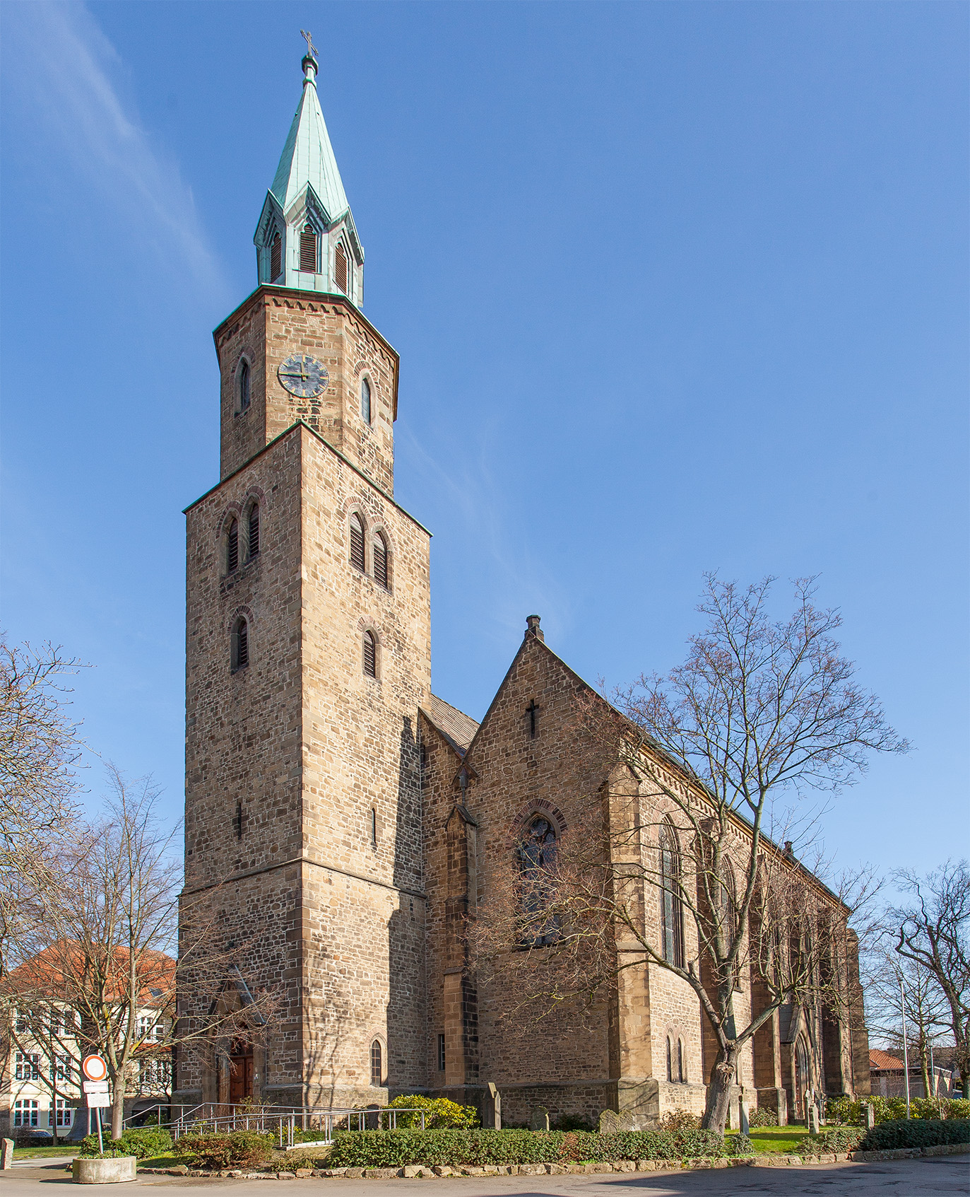 Schötmar (Bad Salzuflen), Ev.-ref. Kilianskirche This is a photograph of an architectural monument.